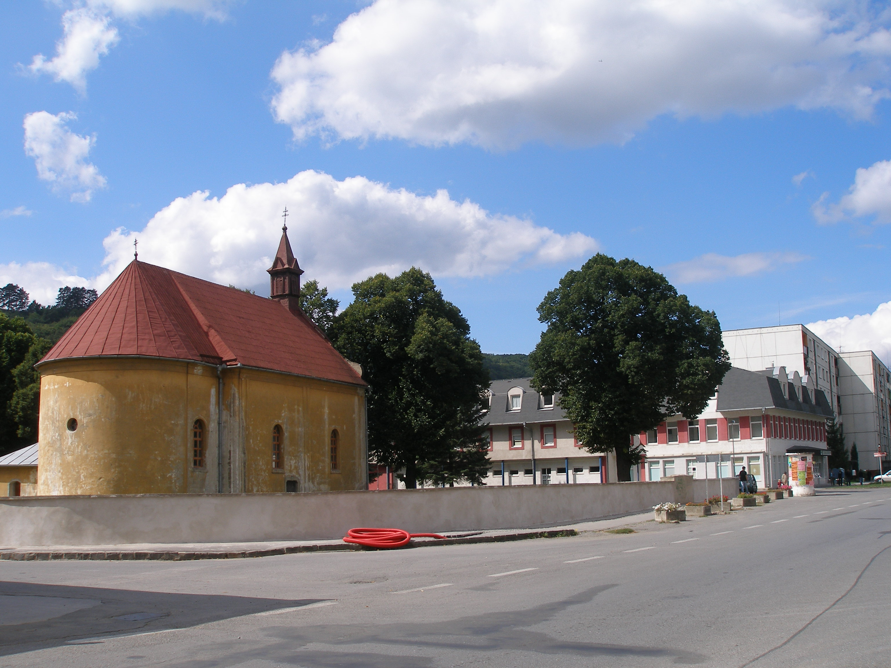 Sabinov starobylé bývalé slobodné kráľovské mesto na Slovensku. Dnes okresné mesto v regióne Šariš.